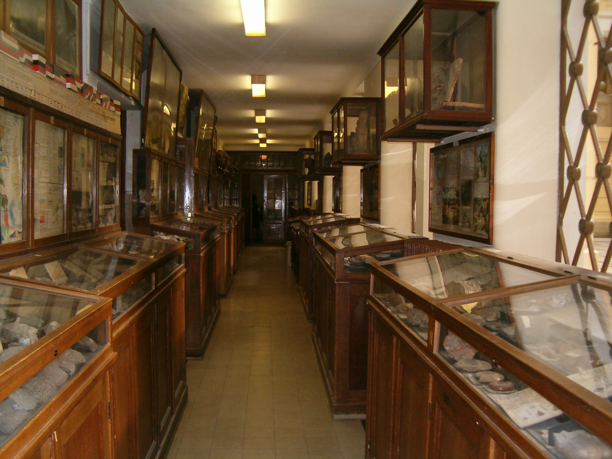 Debreceni Egyetem Ásványtani Intézetének folyosója photo taken by myself, in 2005 Váradi Zsolt 11:10, 30 September 2005 (UTC)